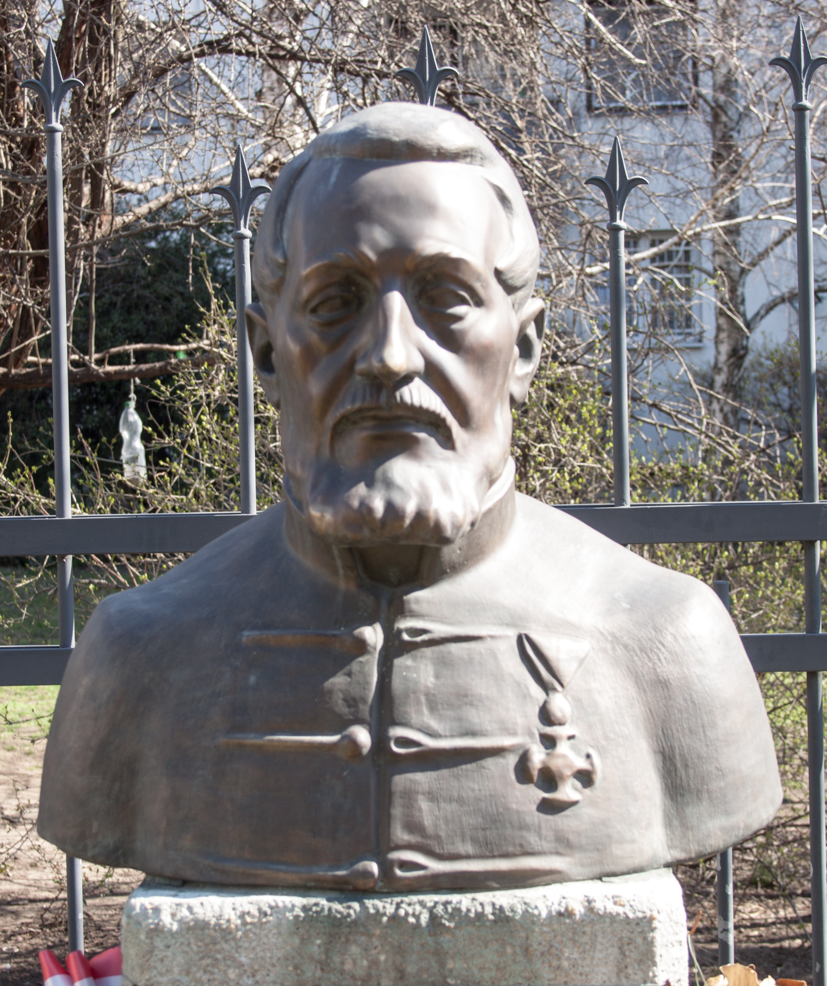 Bust of Ábraham Ganzlabel QS:Len,"Bust of Ábraham Ganz" label QS:Lhu,"Ganz Ábraham mellszobra"